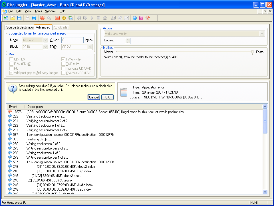 screenshot de discjuggler version 4.6